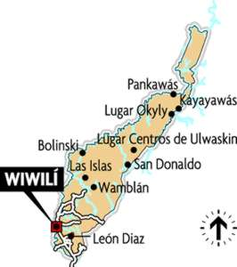 croquis de wiwili